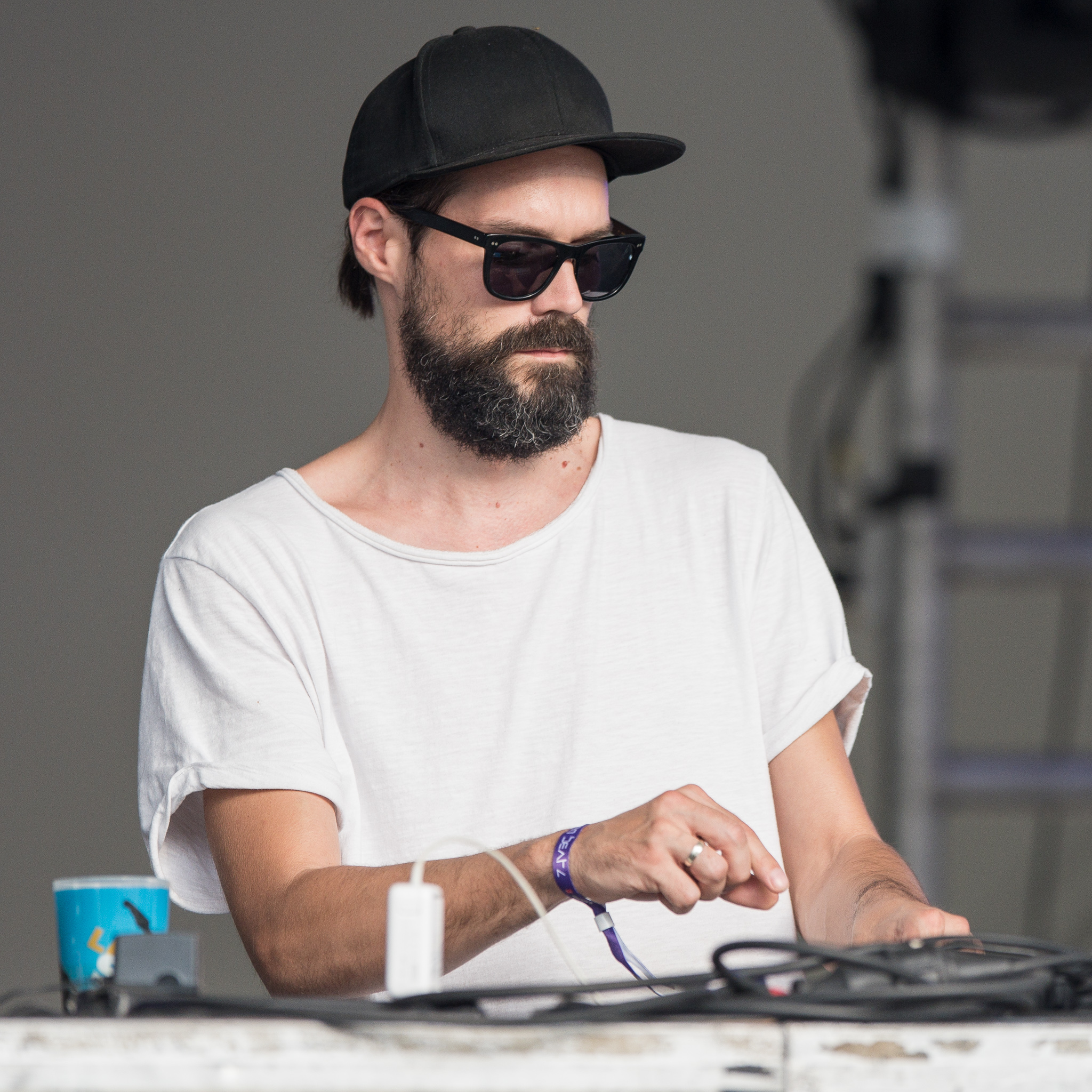 Einmusik,Festival,Konzert,Lakestage,Livekonzert,Livemusik,Musik,Open Beatz 2016,Samuel Kindermann